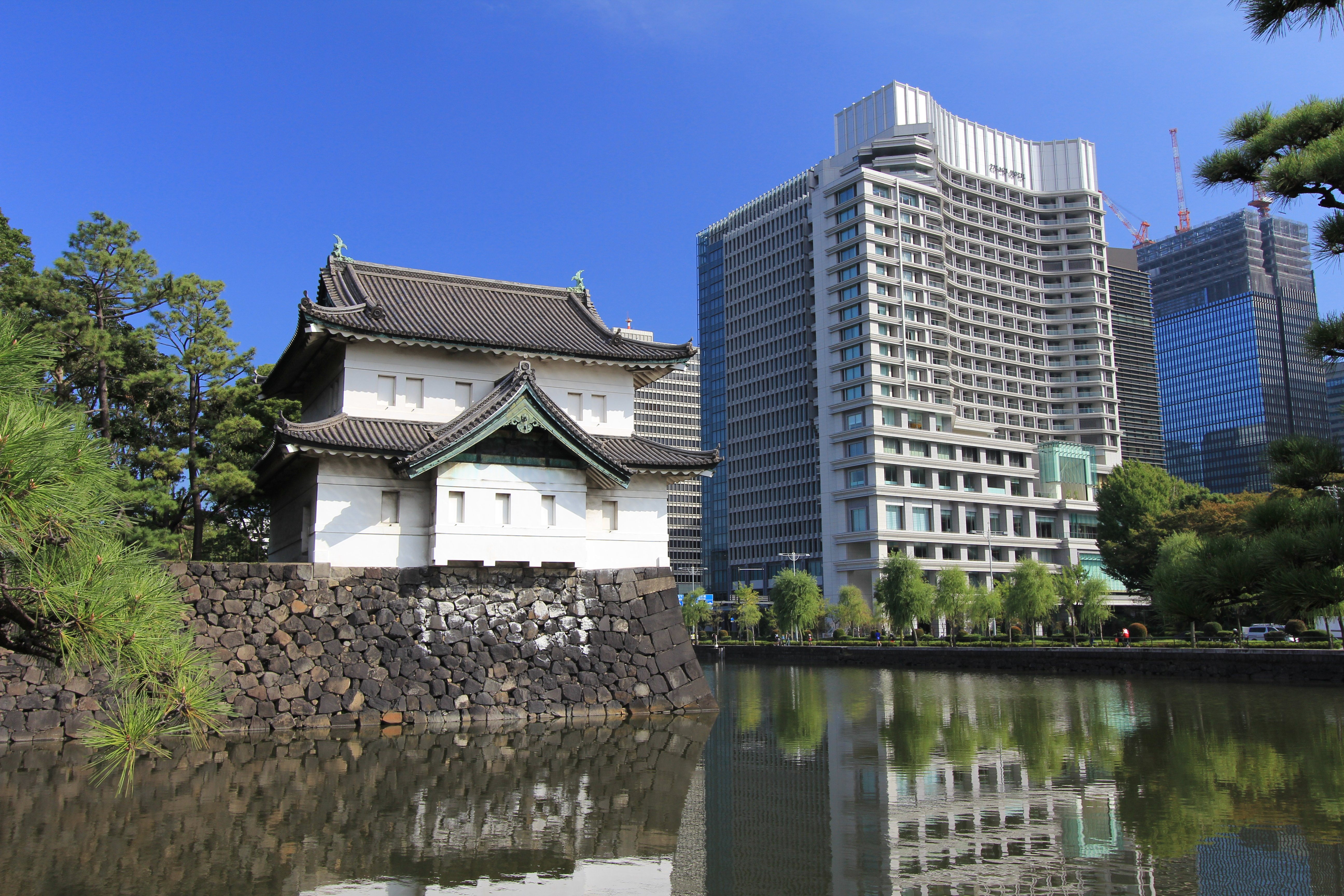 皇居